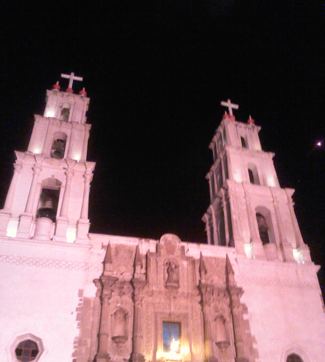 Iglesia principal del municipio en su vista nocturna